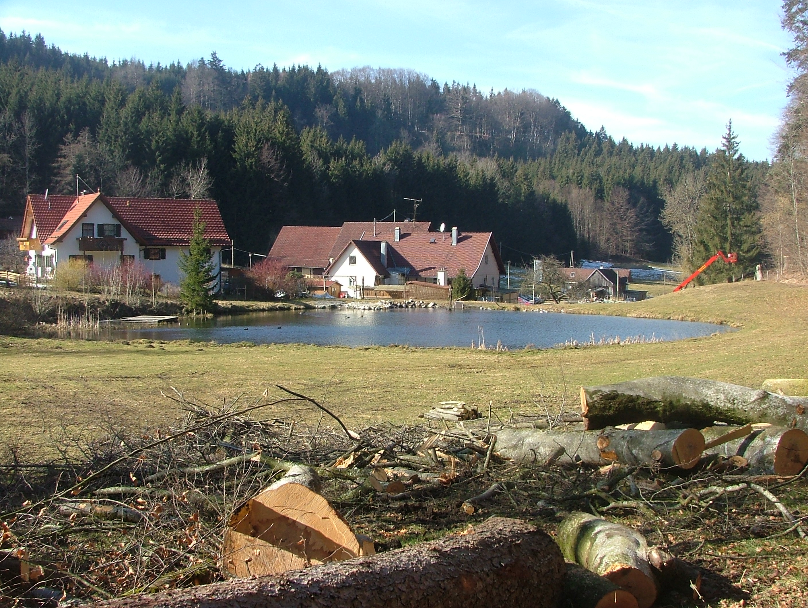 Ehwiesmühle